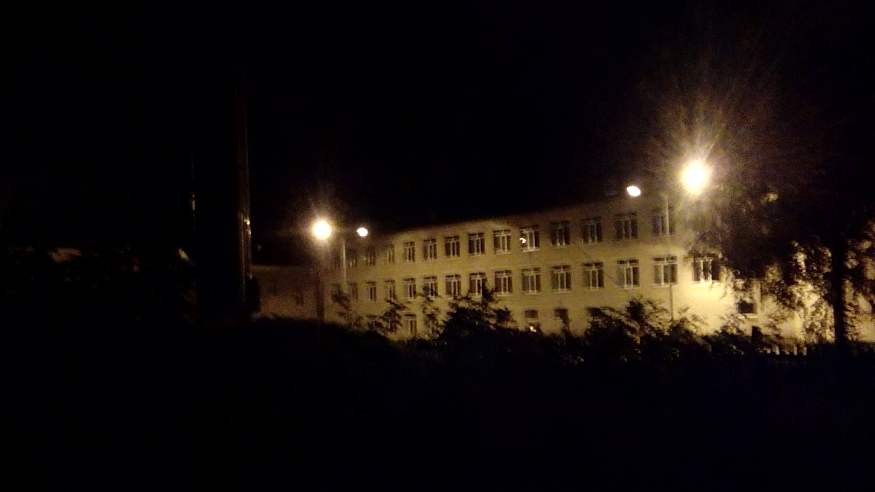 Вид в ночное время на головное здание